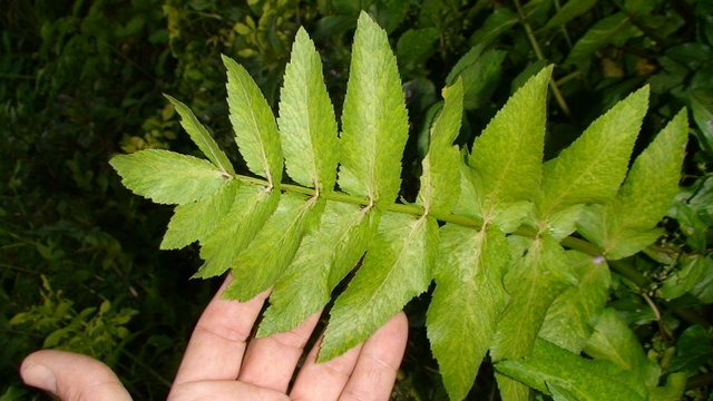 نباتات برية سورية تؤكل